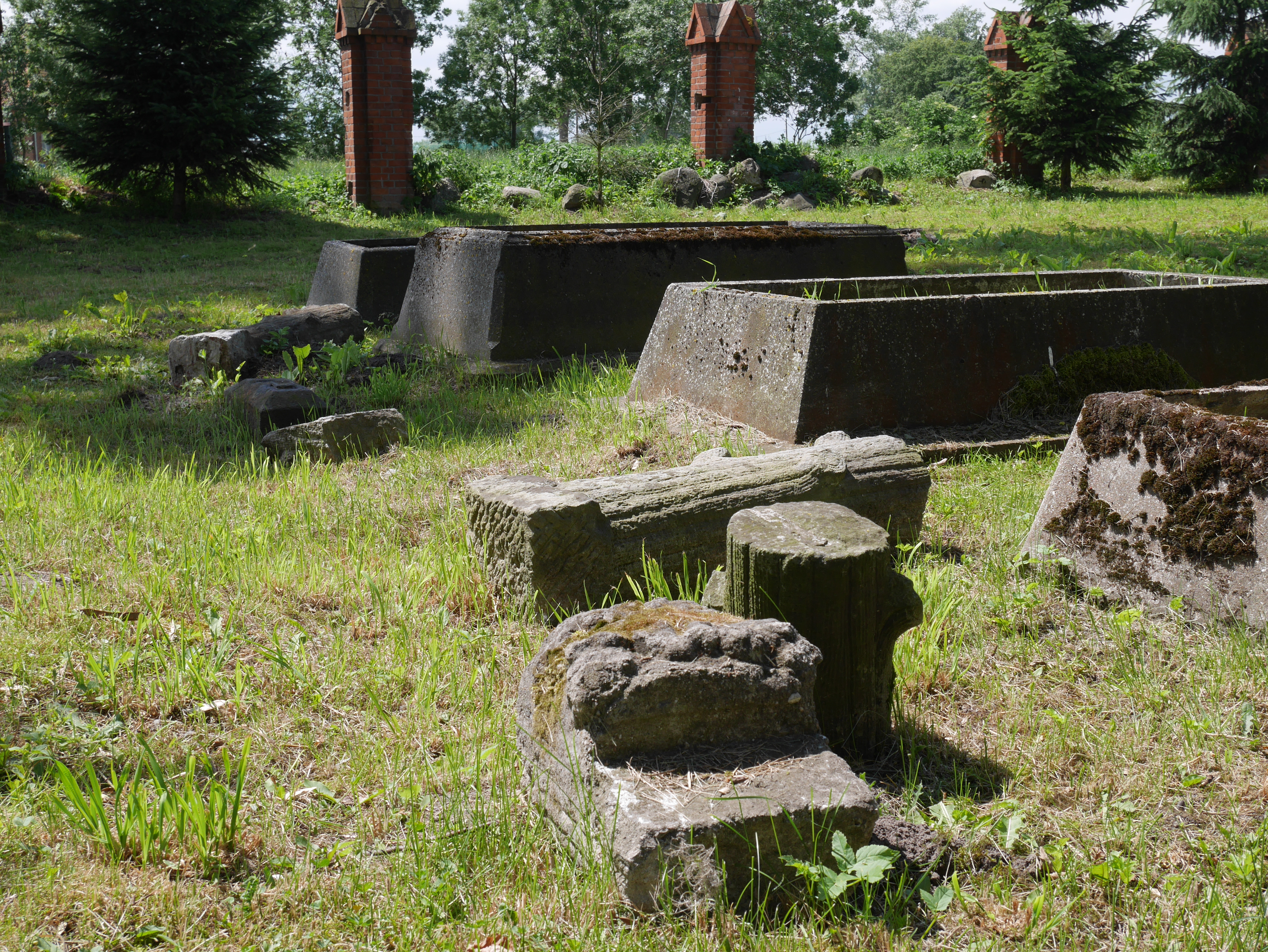 Cmentarz Mennoicki w Międzyłężu